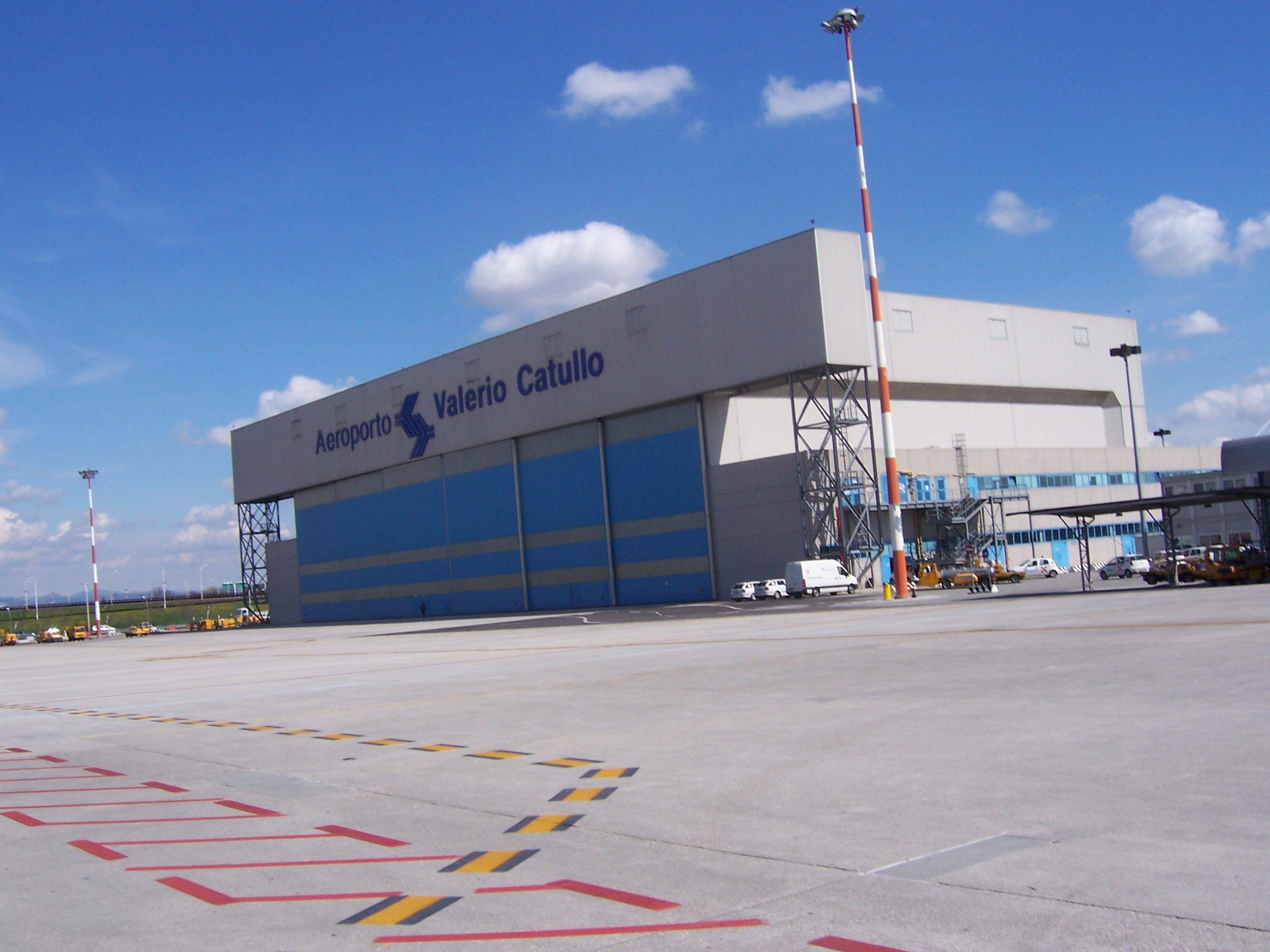 Flugplatz Verona2